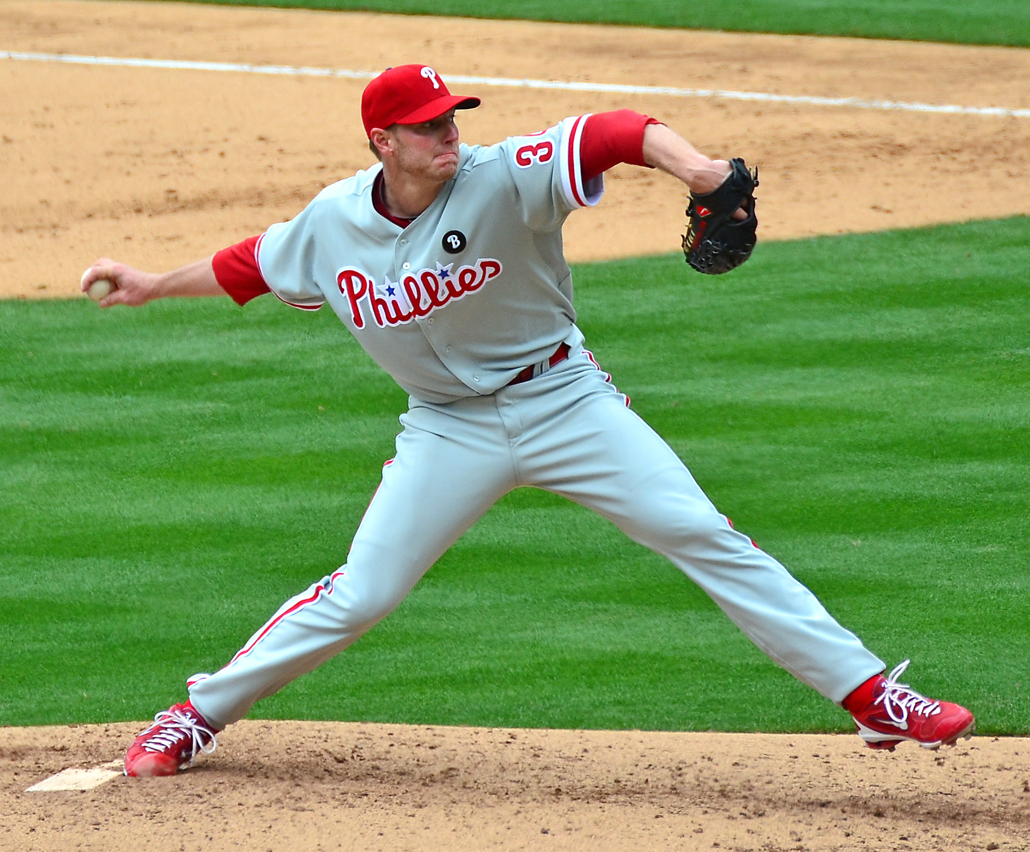 Roy Halladay